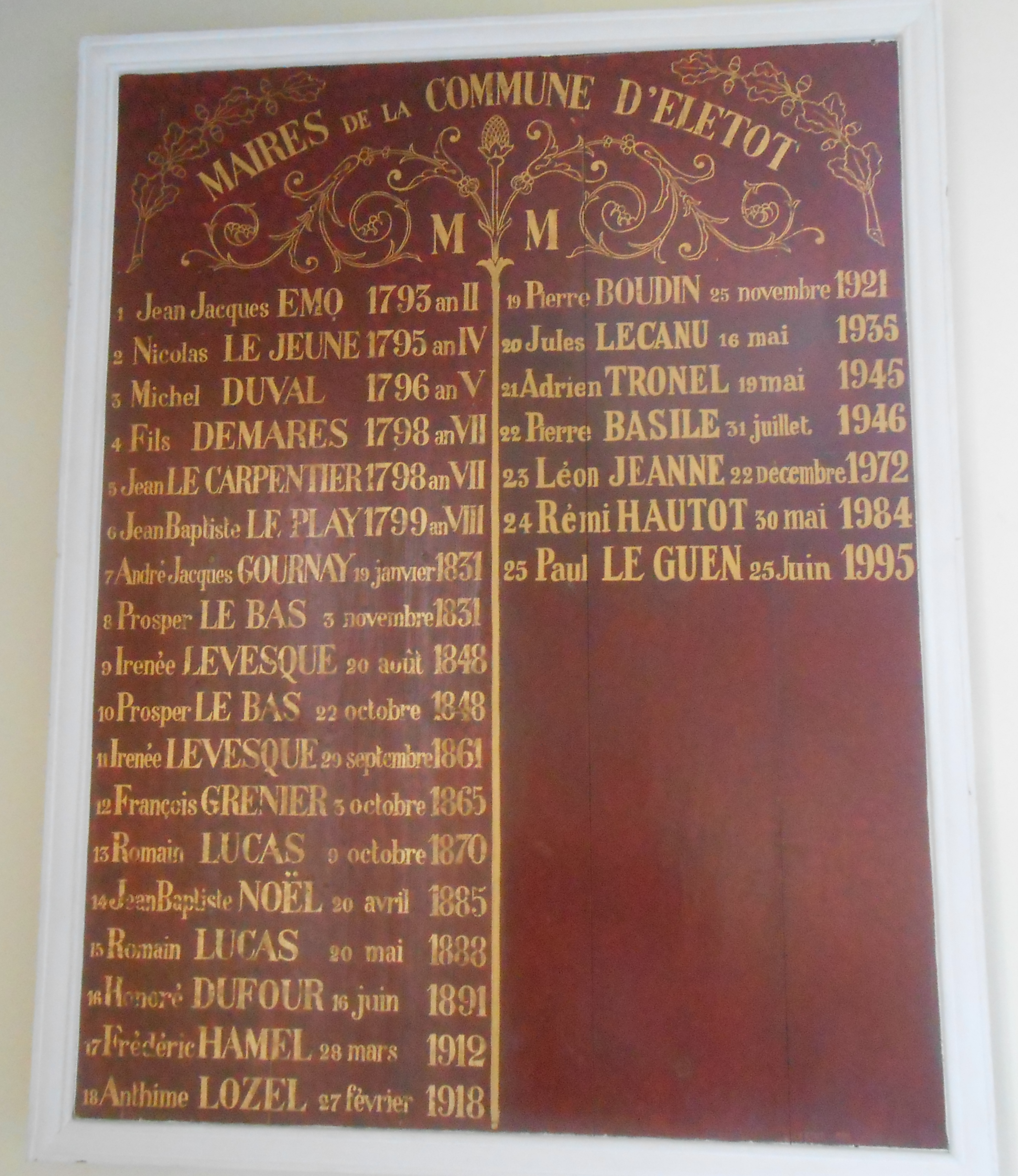 Plaque commémorative contenant la liste des maires de la commune d'Eletot (Seine-Maritime), située dans la mairie.